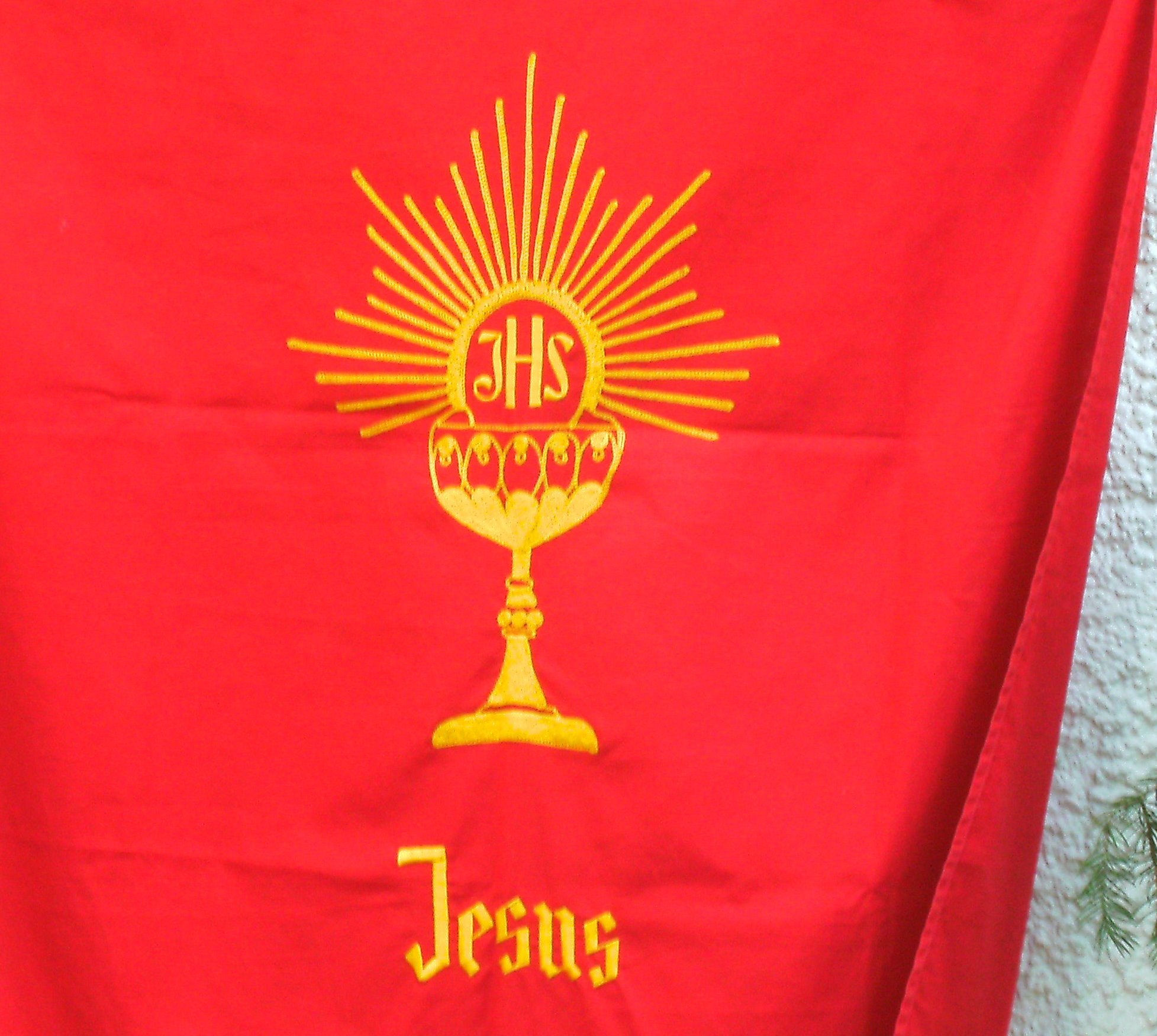 Blutritt Weingarten 2008, Fensterschmuck an einer Altarstation